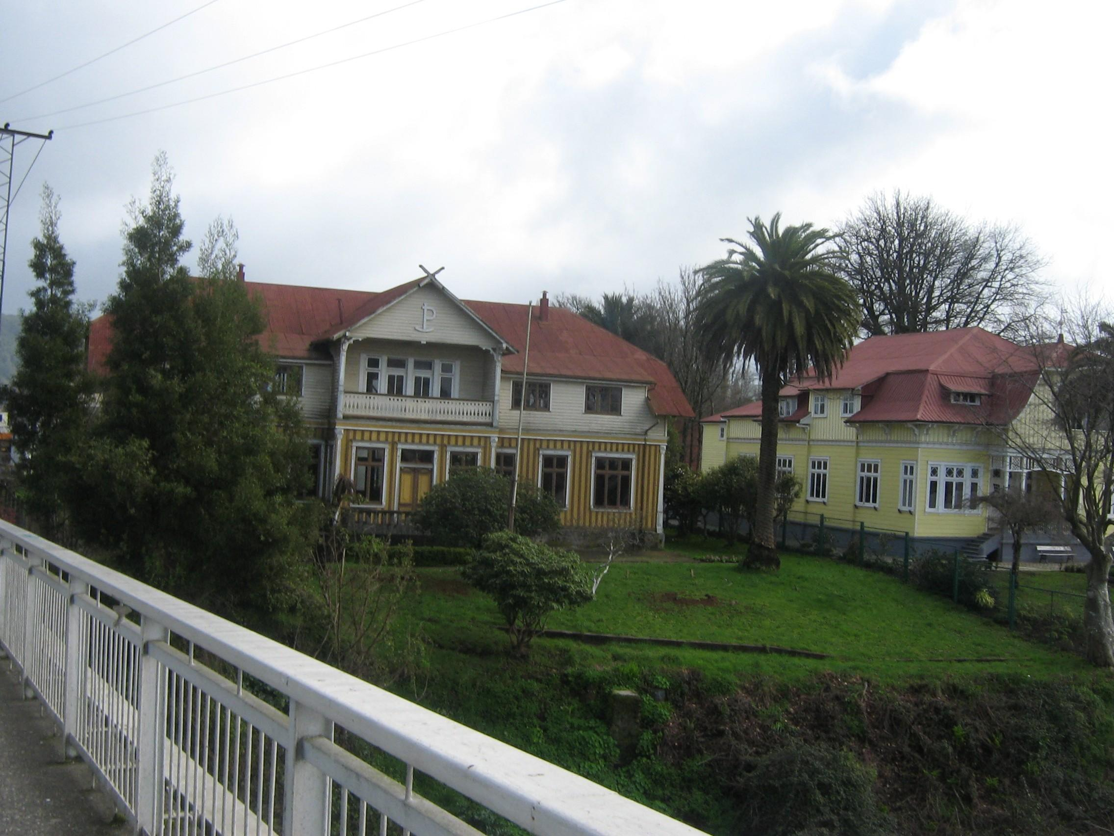 Palacio Prochelle, a la entrada de la Isla Teja